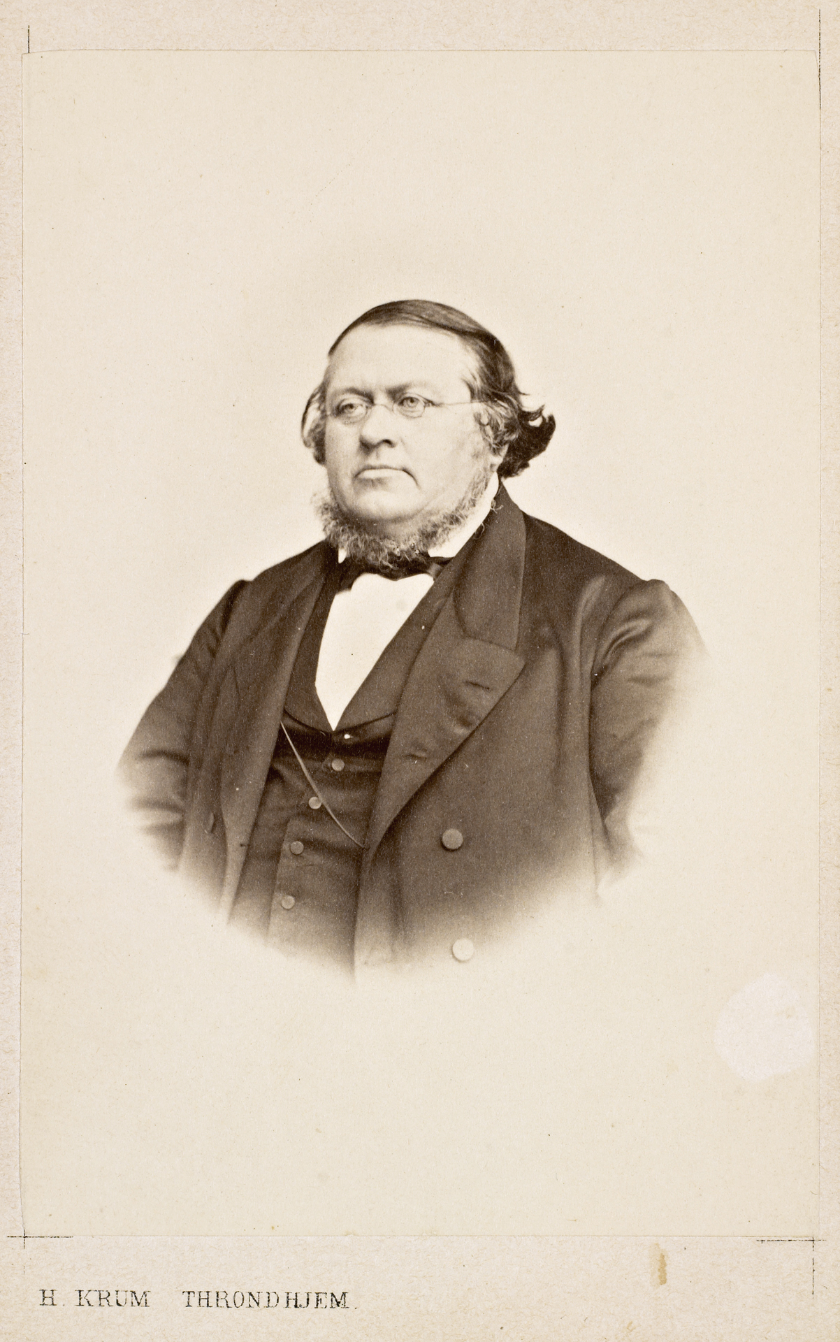 Visittkortportrett / Carte de visite